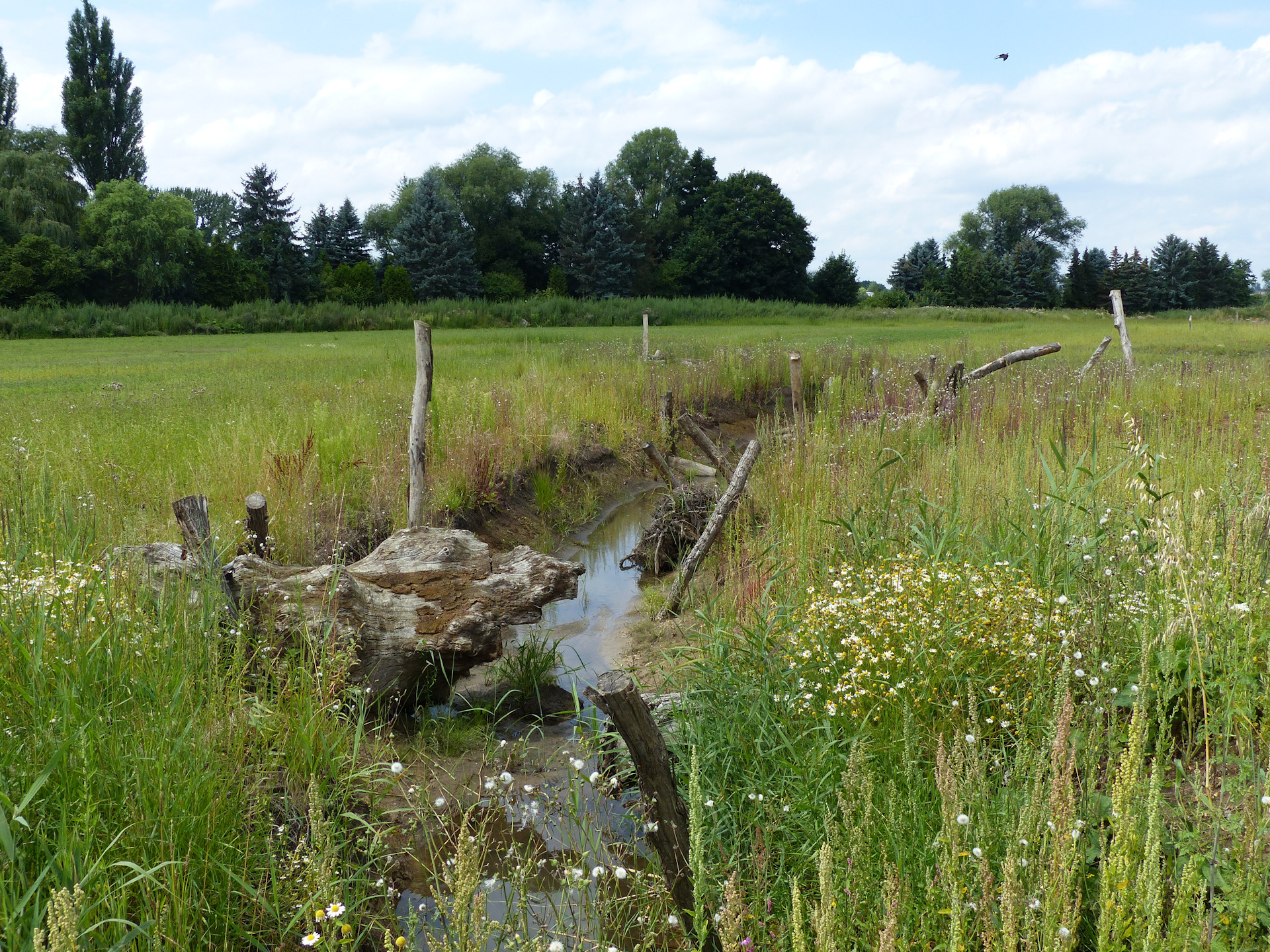 Renaturierter Abschnitt der Wabe auf der Höhe der Rautheimer Mühle